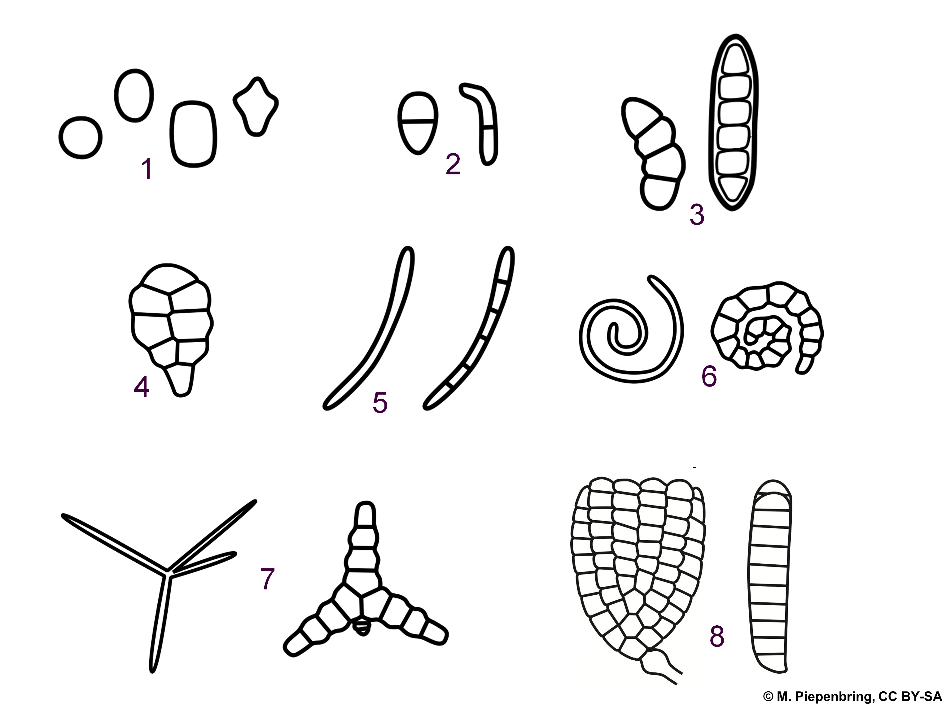 Types of conidia